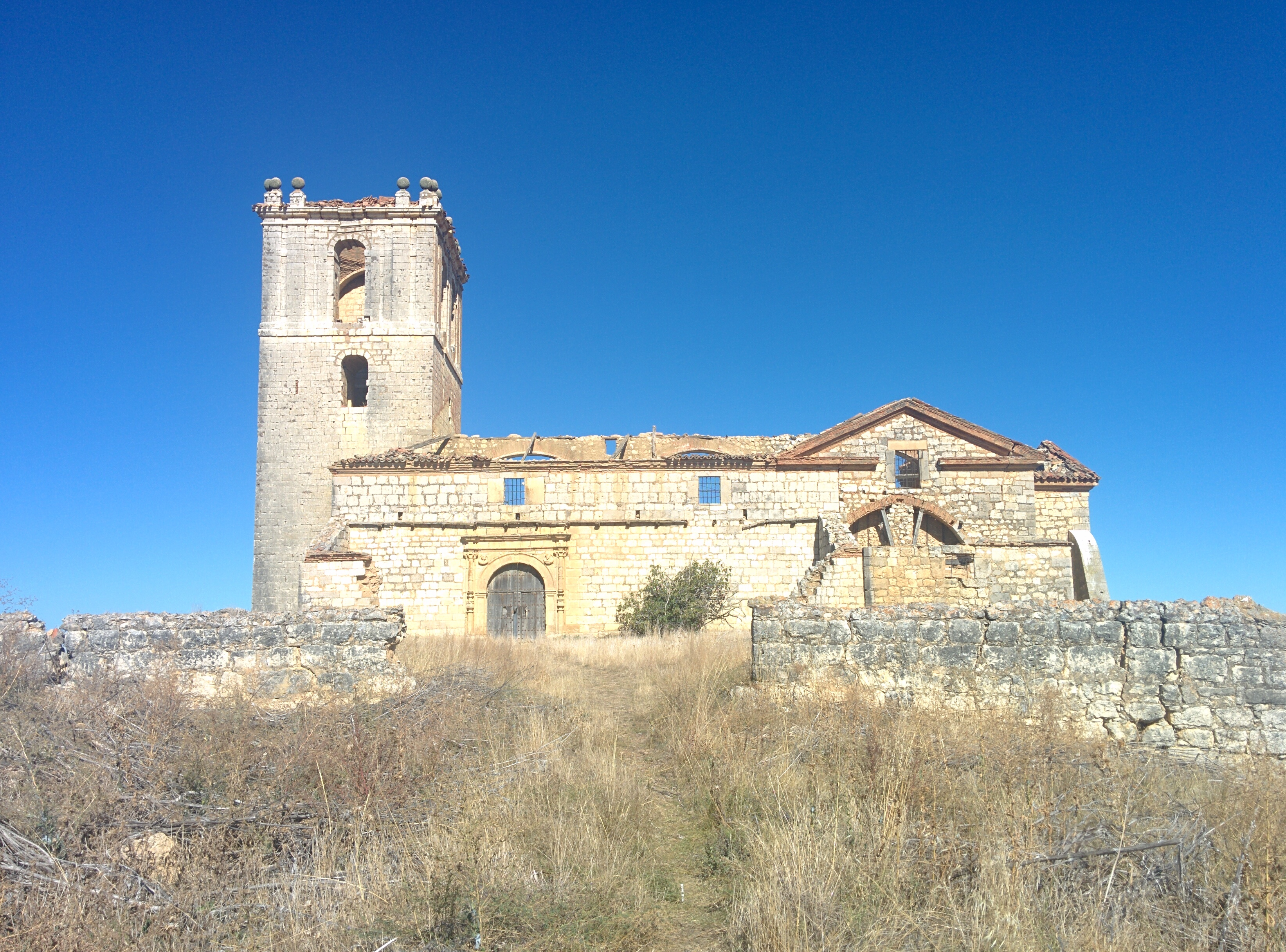 Iglesia de San Miguel, Villavellid (Valladolid, España).